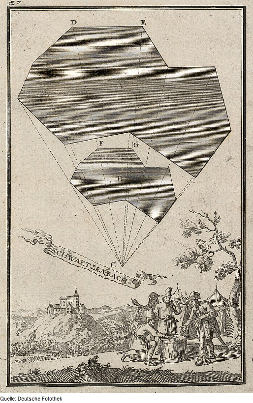 Original image description from the Deutsche FotothekGeometrie & Architektur & Festungsbau & Vermessung